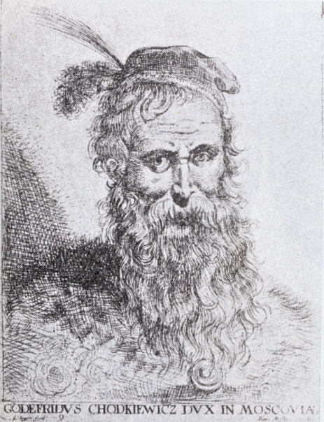 Jan Karol Chodkiewicz.